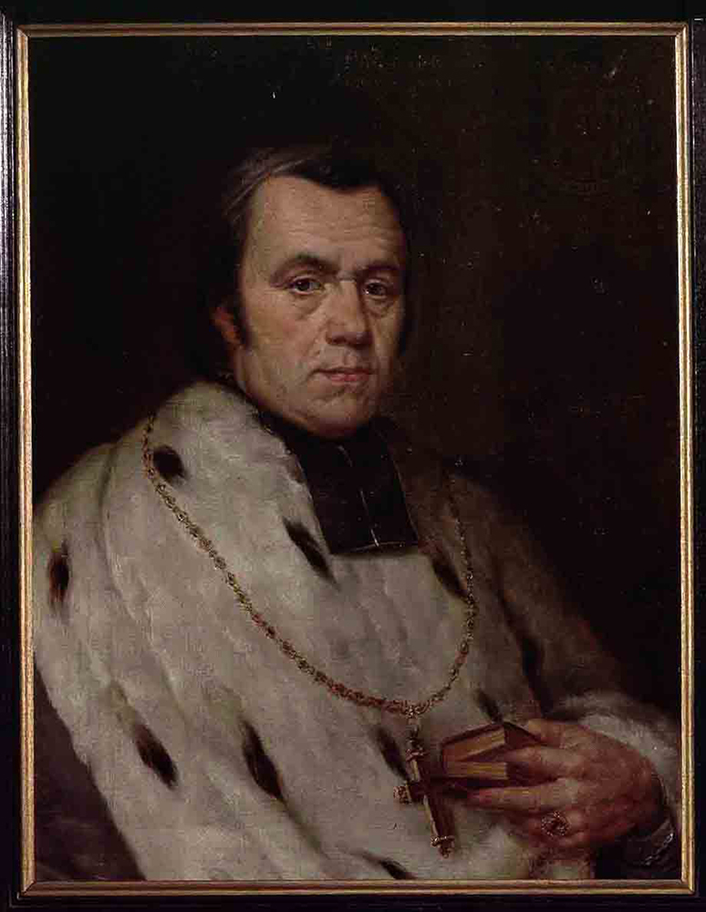 Sint-Baafskathedraal, Gent Portret van Mgr. Van De Velde; inv nr: 499/20